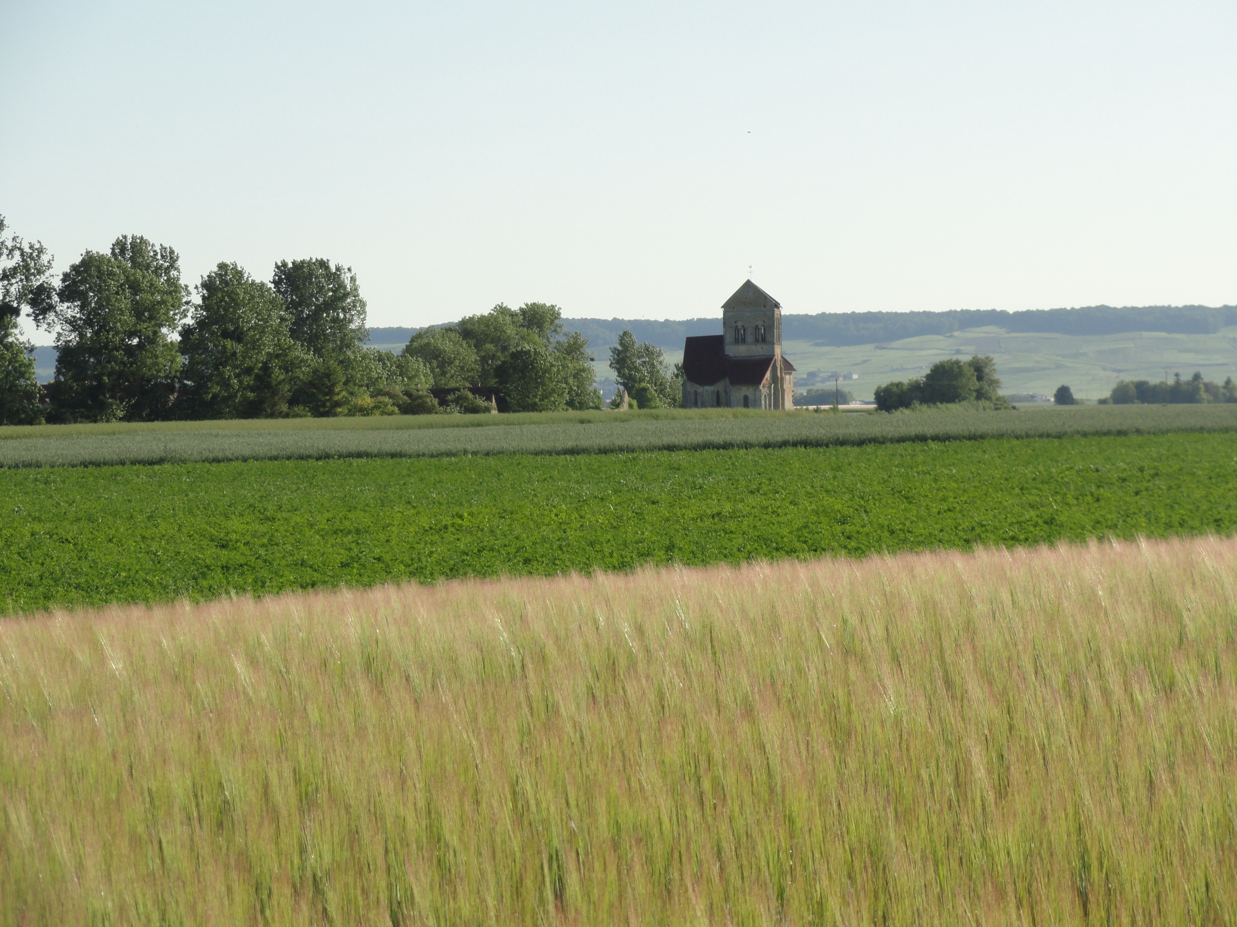 Vue de l'église sainte-hélène des Istres et en fond de la Côte des blancs